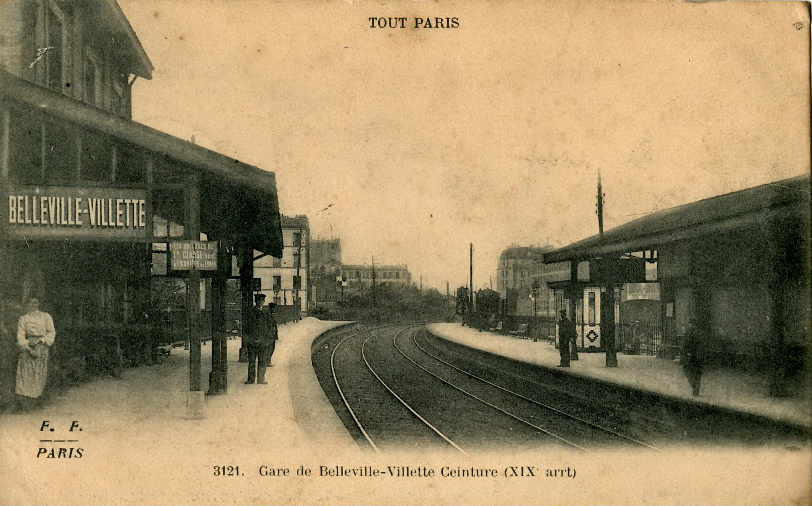 Carte postale anciennée éditée par FF, N°3121 Tout Paris : Gare de Belleville-Villette Ceinture, sur la ligne de Petite Ceinture